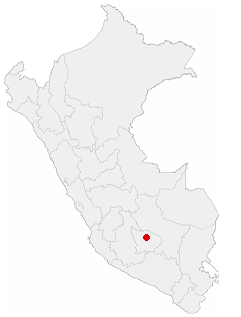 Ubicacion de la Ciudad de Abancay en el sur del Perú, imagen modificada por Discjockey.